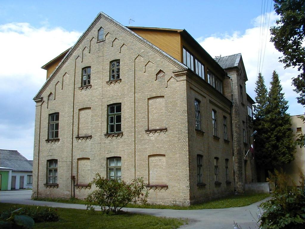 Svētes skola 2002-07-08